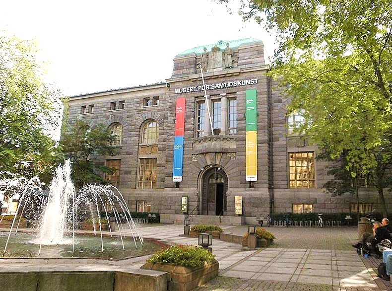 Museum für Gegenwartskunst in Oslo